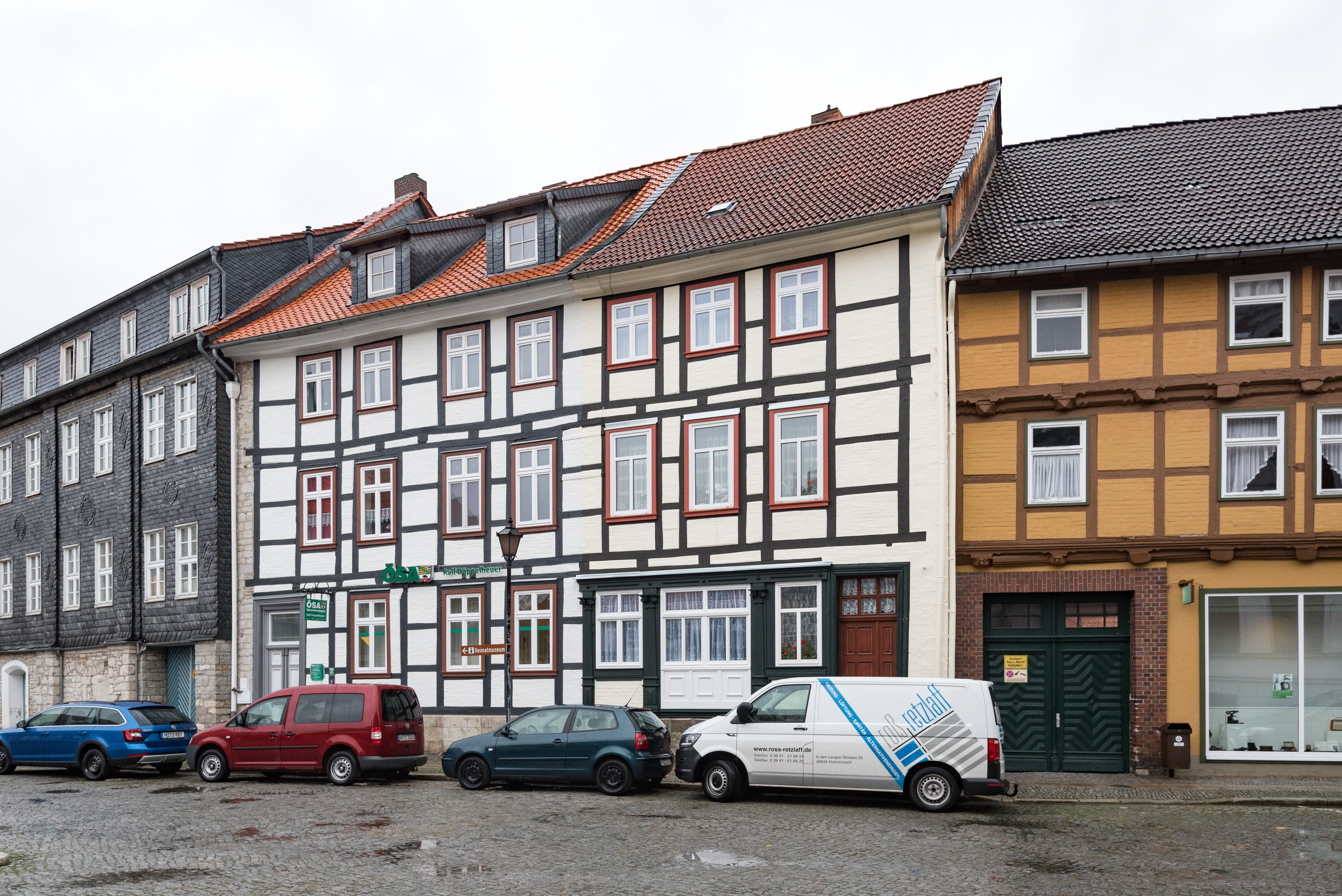 Osterwieck, Am Markt 8, 9